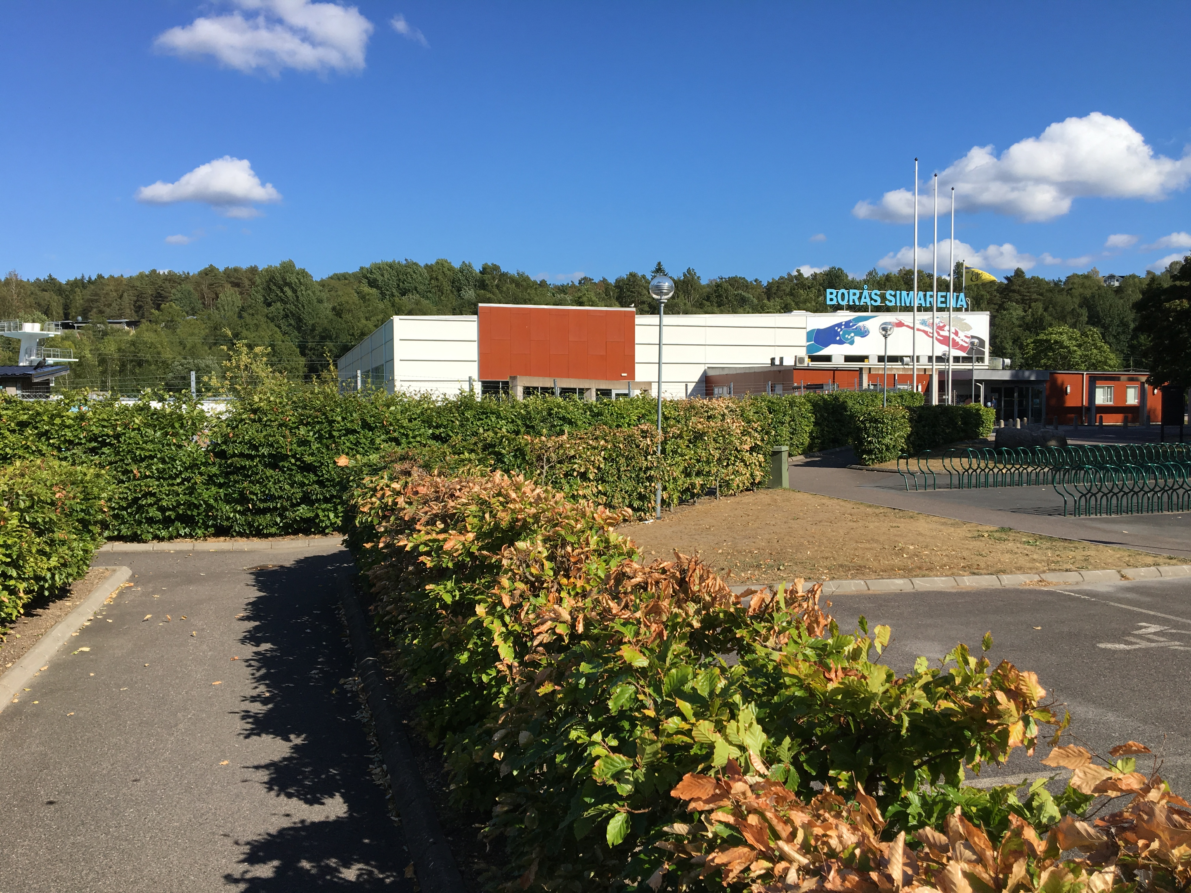 Borås Simarena foto taget av Machatjkala 2018-08-04 kl 16:42.